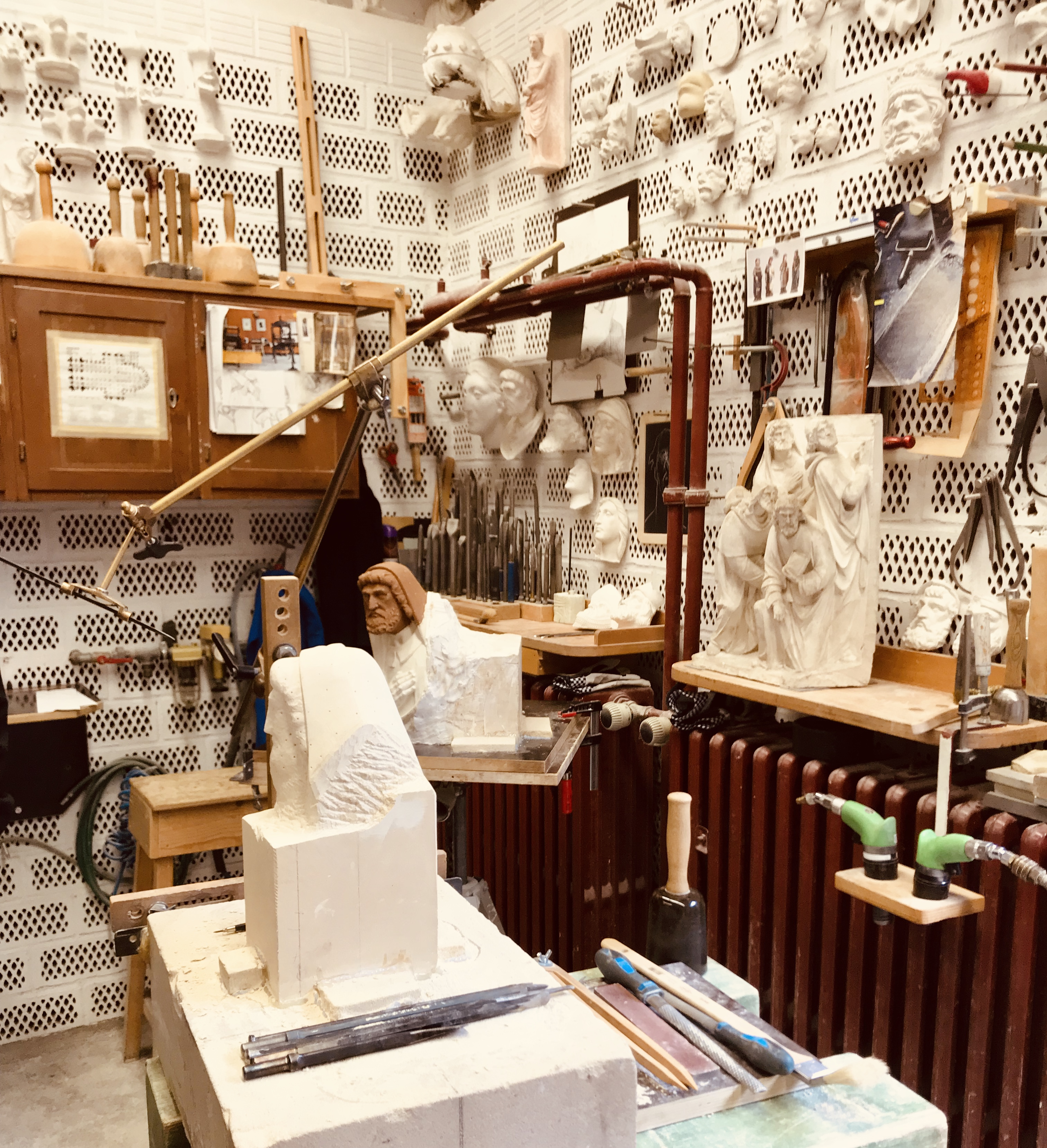 Dombauhütte Köln: Anhand der Vorlagen aus dem 19. Jahrhundert (hinten rechts) formt der Steinbildhauer die Figur (hier: den zerstörten Kopf, Bildmitte), der vom Steinmetz mittels Punktiergerät in den Stein übertragen wird (Vordergrund)